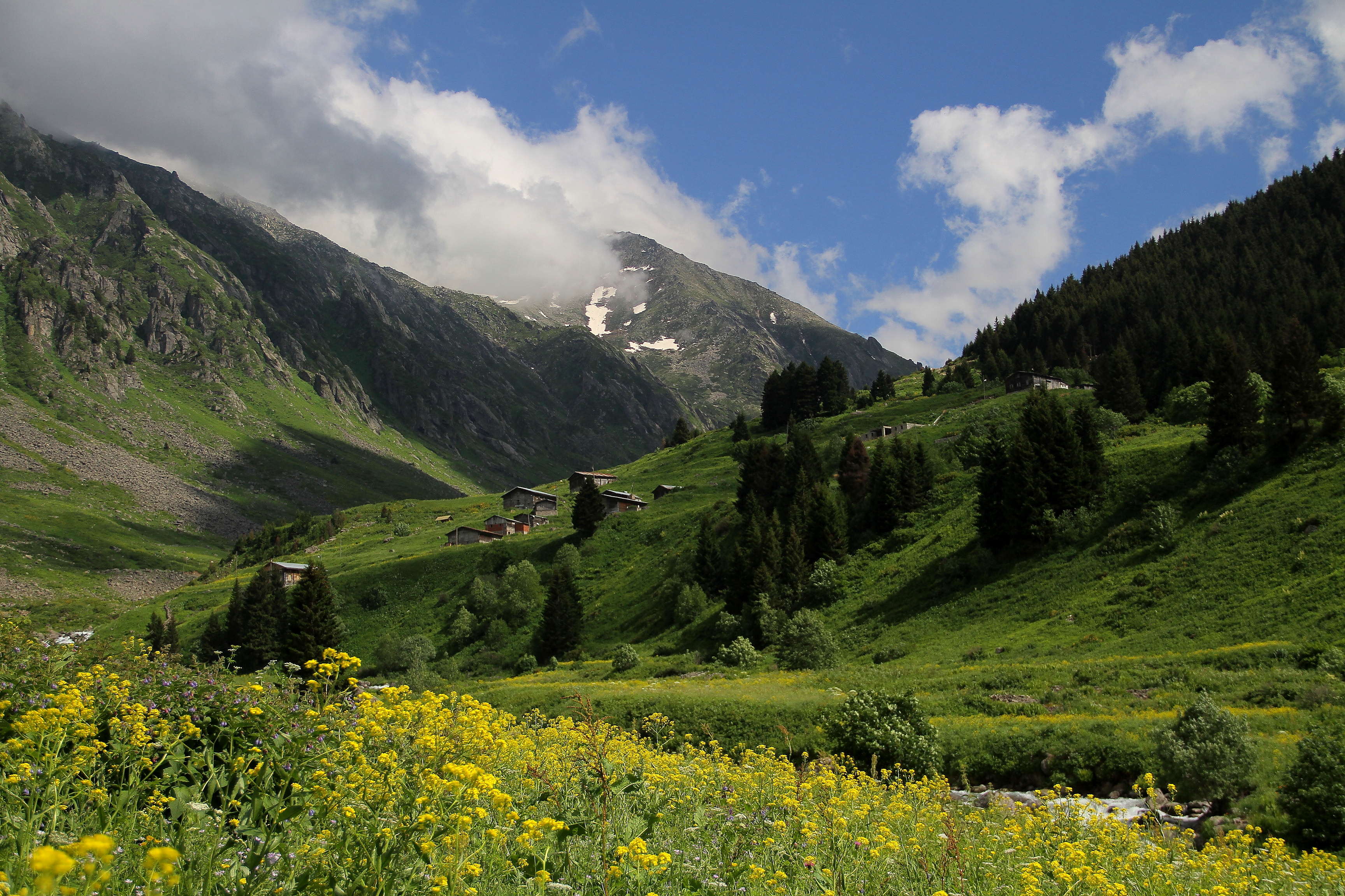 Elevit Yaylası Rize, Fotoğraf; Metin Çorapçı